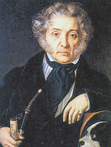 Толстой, Фёдор Иванович